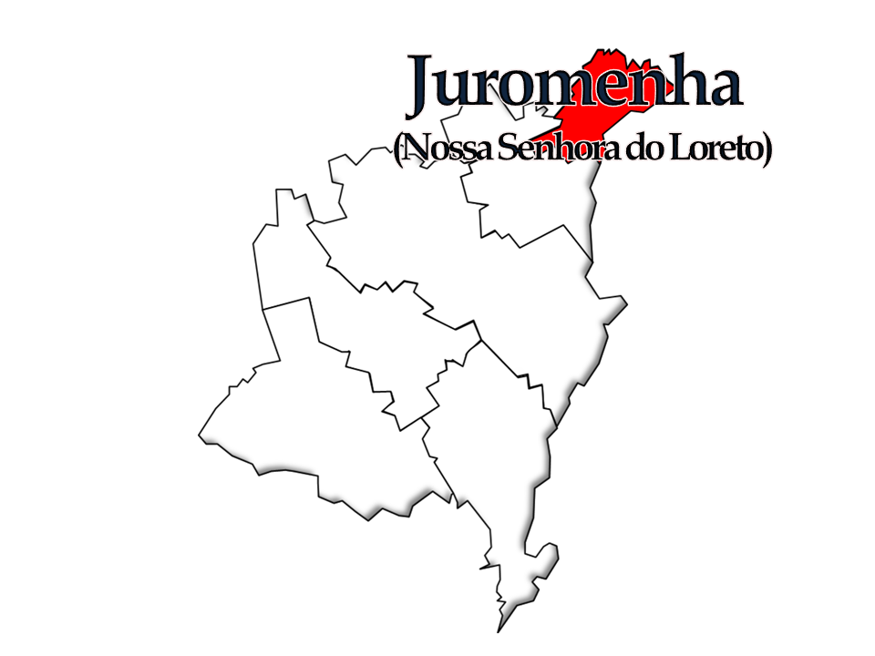 Censos 1864/2011